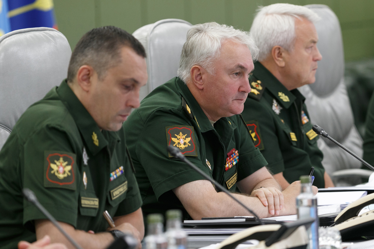 Заместитель Министра обороны Российской Федерации — начальник Главного военно-политического управления Вооруженных Сил Российской Федерации генерал-полковник Андрей Картаполов на селекторном совещании в Национальном центре управления обороной.